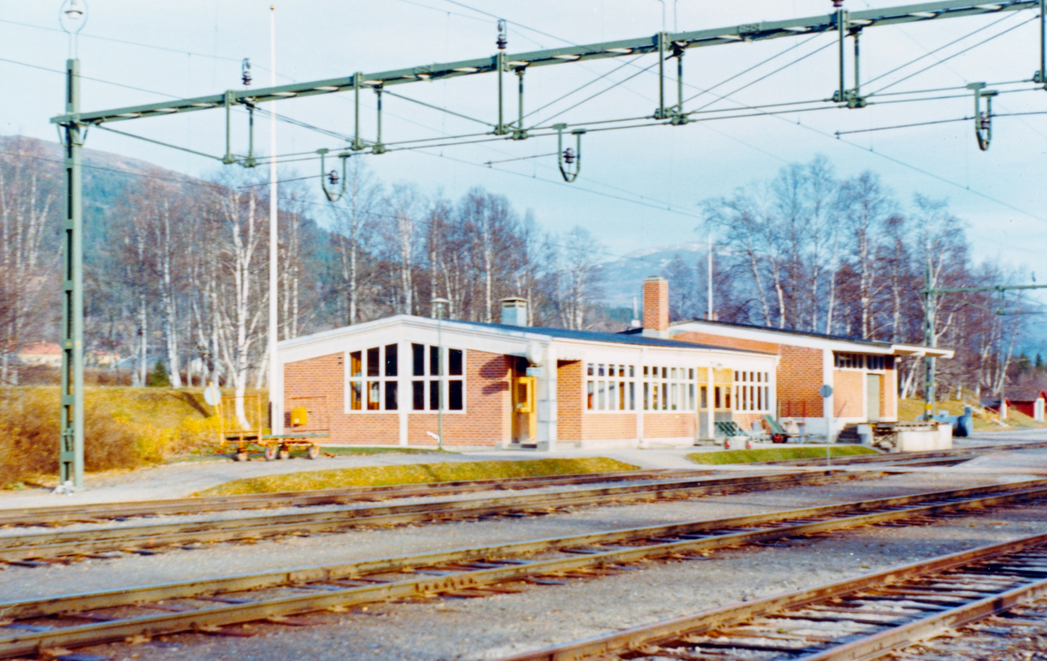 Järnvägsstationen i Duved från 1950-talet.